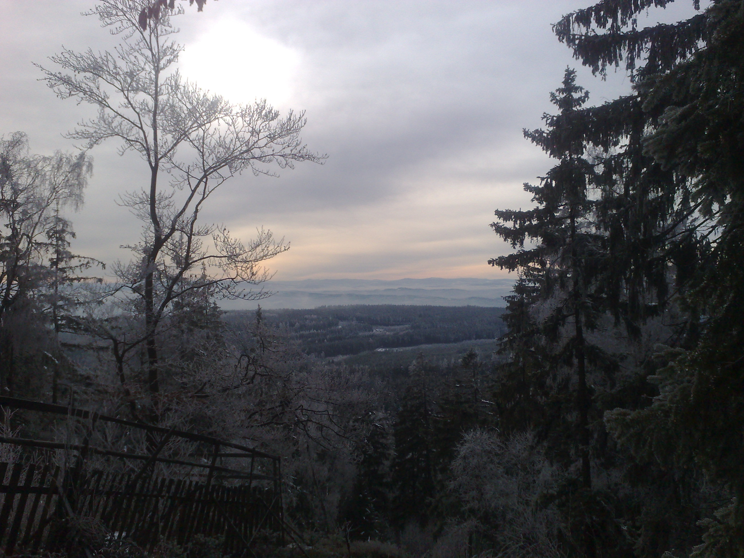 Pohled z vrcholu Třemšína